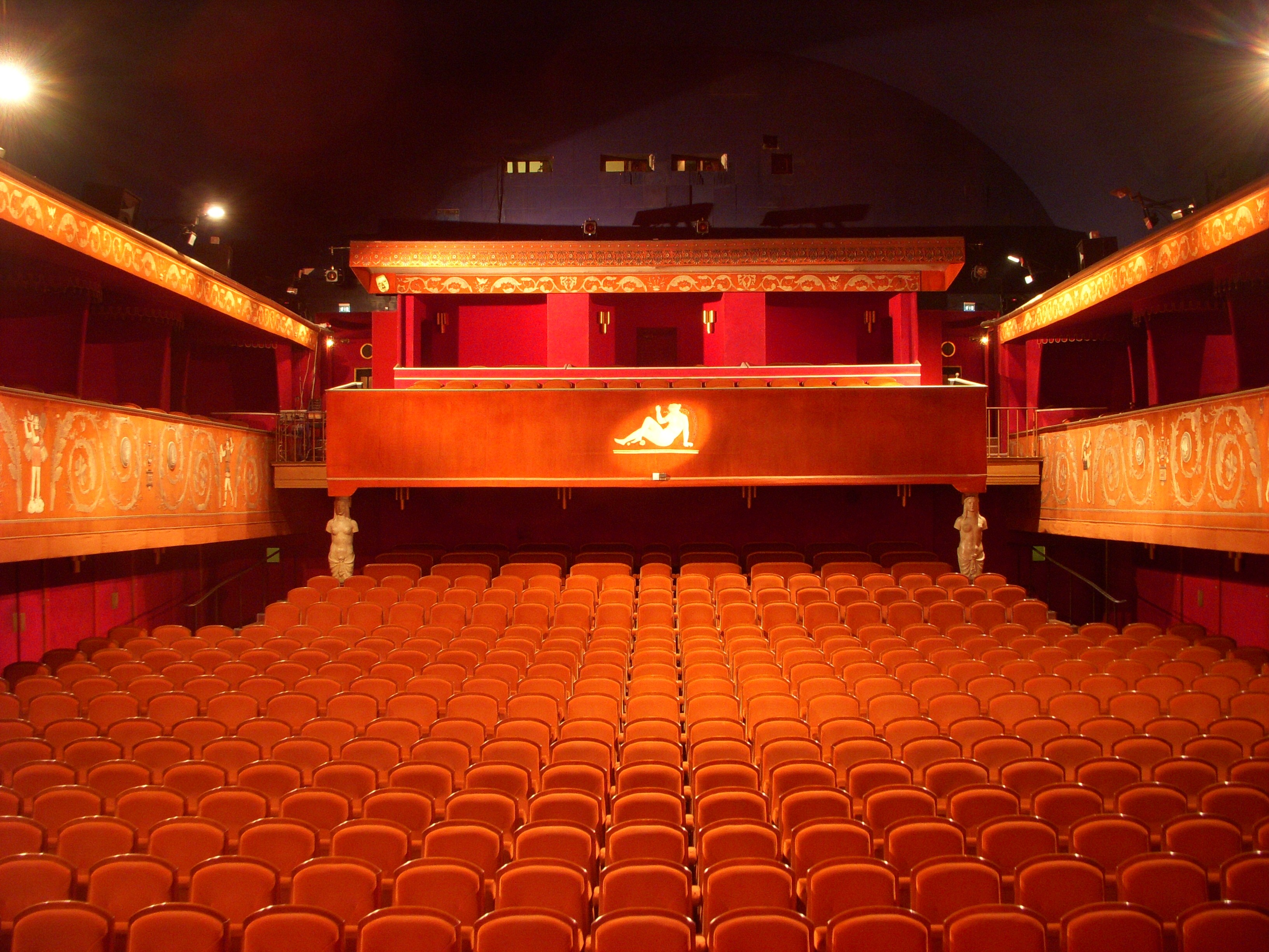 Skandia teatern, salongen